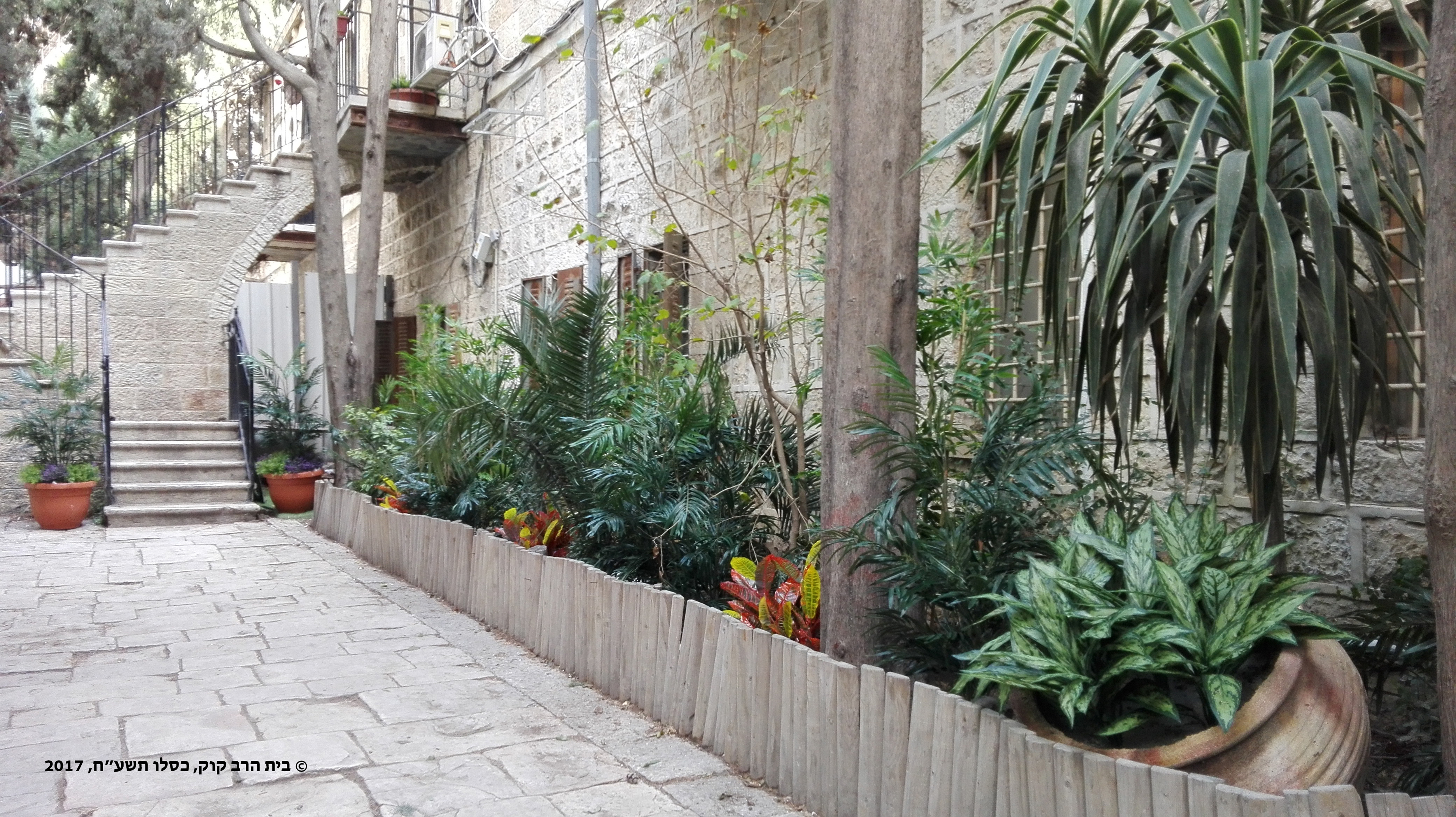 בית הרב קוק - חצר הכניסה. בבית זה התגורר הראי"ה קוק משנת 1923 ועד לפטירתו בשנת 1935